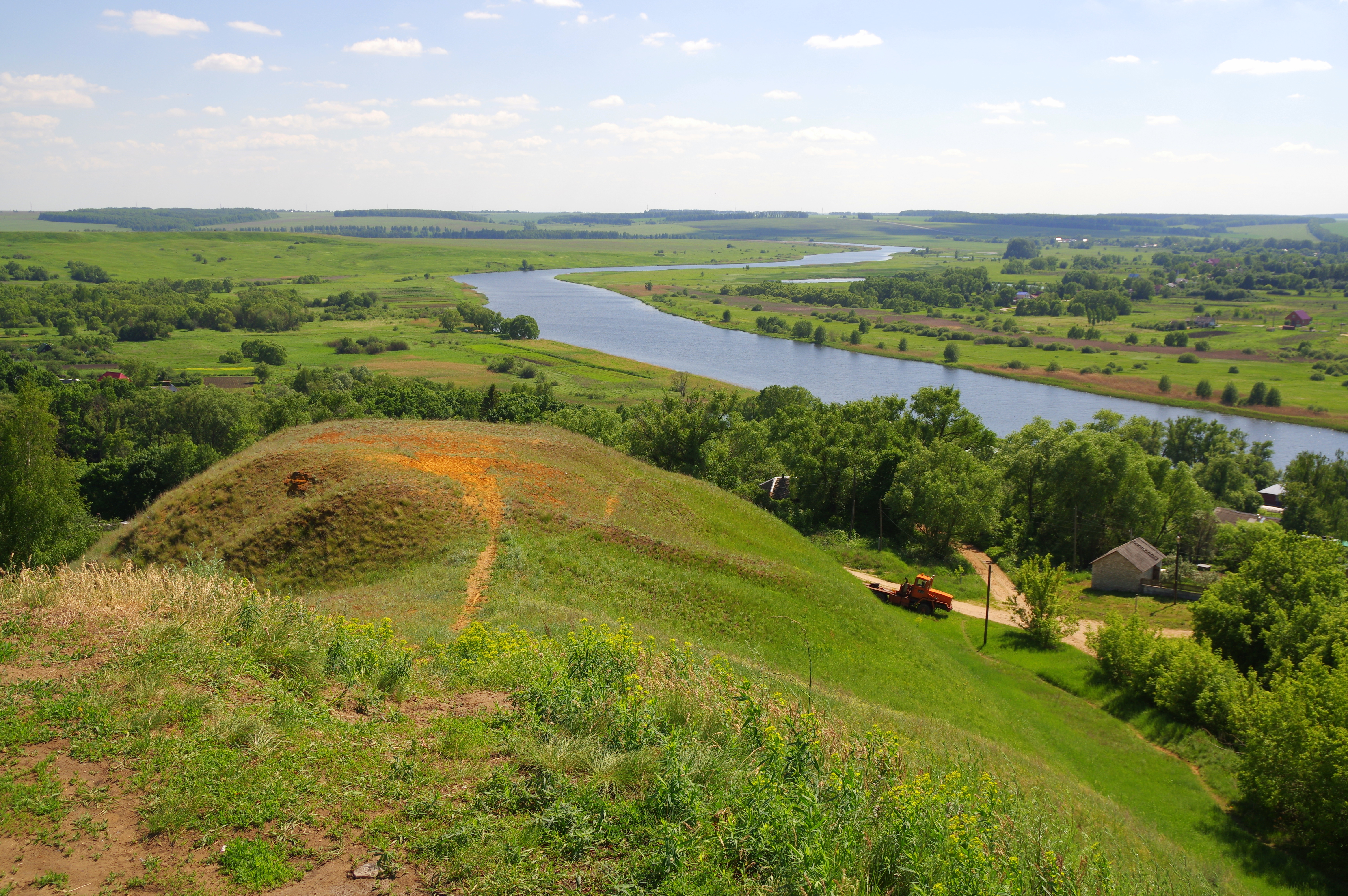 Городище "Пронское-I" (детинец средневекового г. Пронск): урочище Покровская Гора, Пронск, Пронский район, Рязанская область